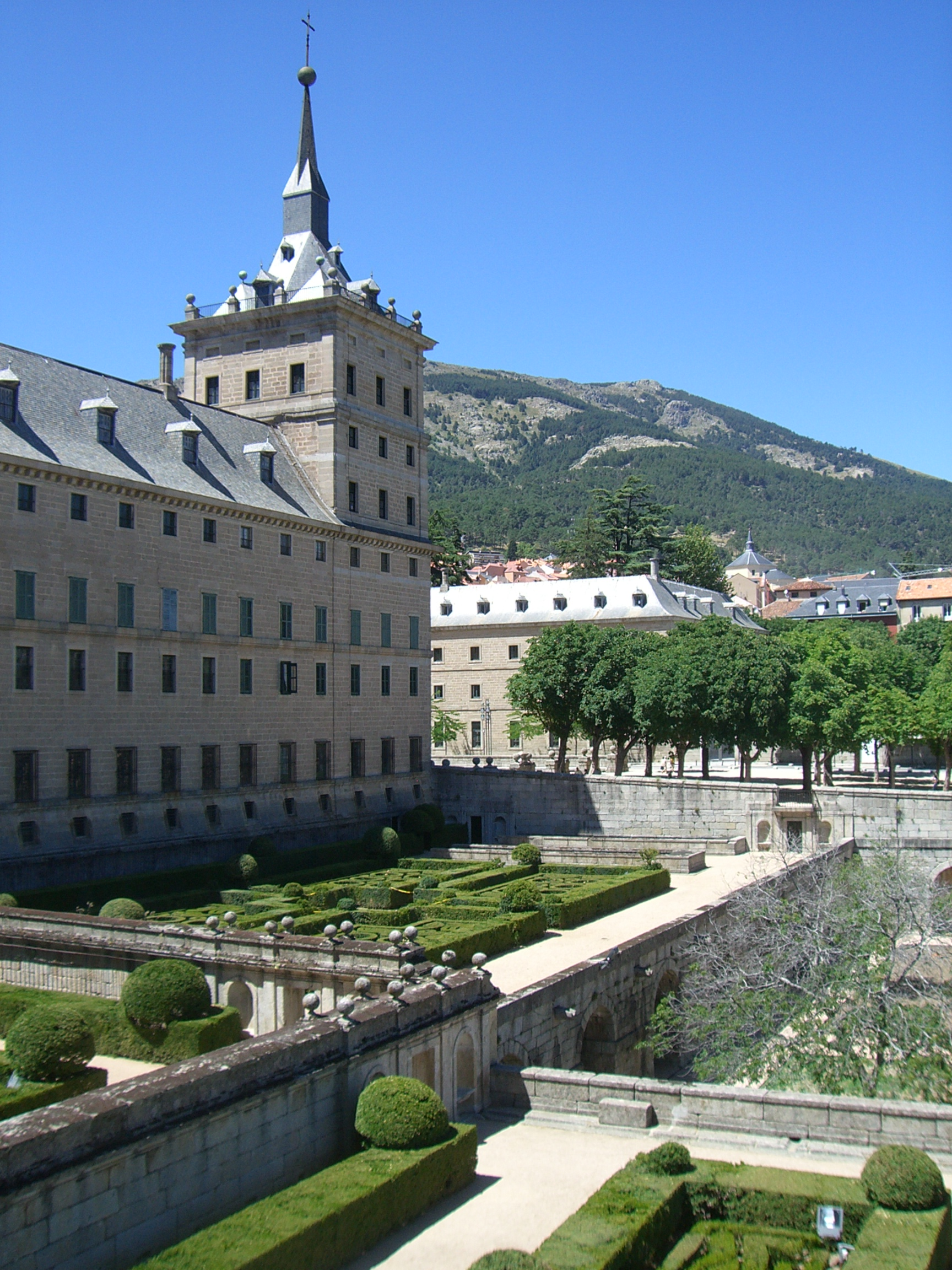 Vista del Monasterio desde sus jardines